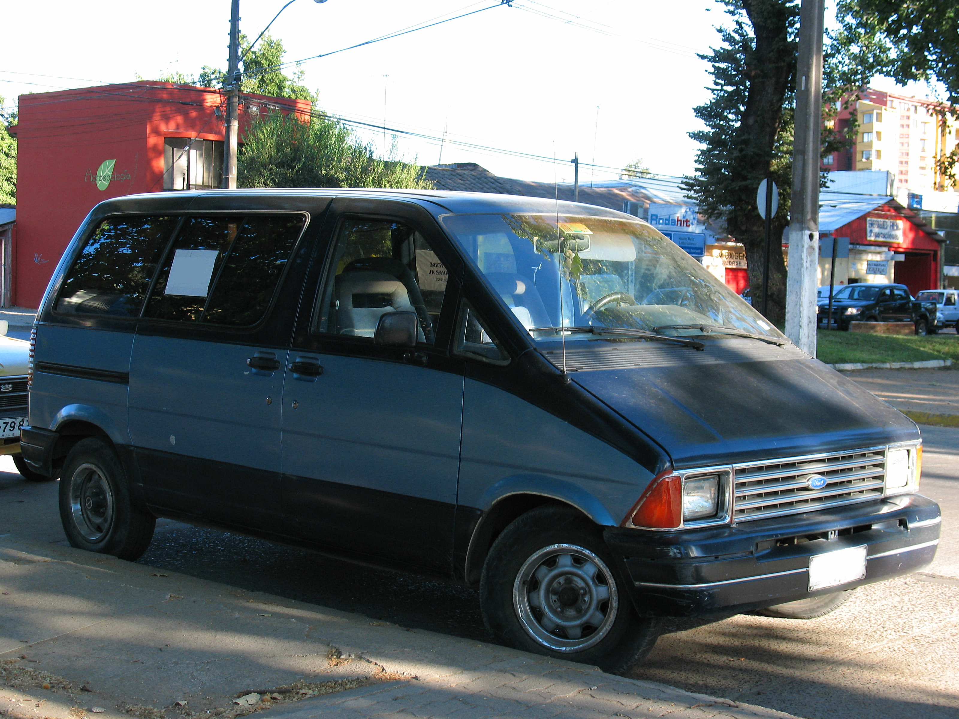 Ford Aerostar 3.0 XLT 1987